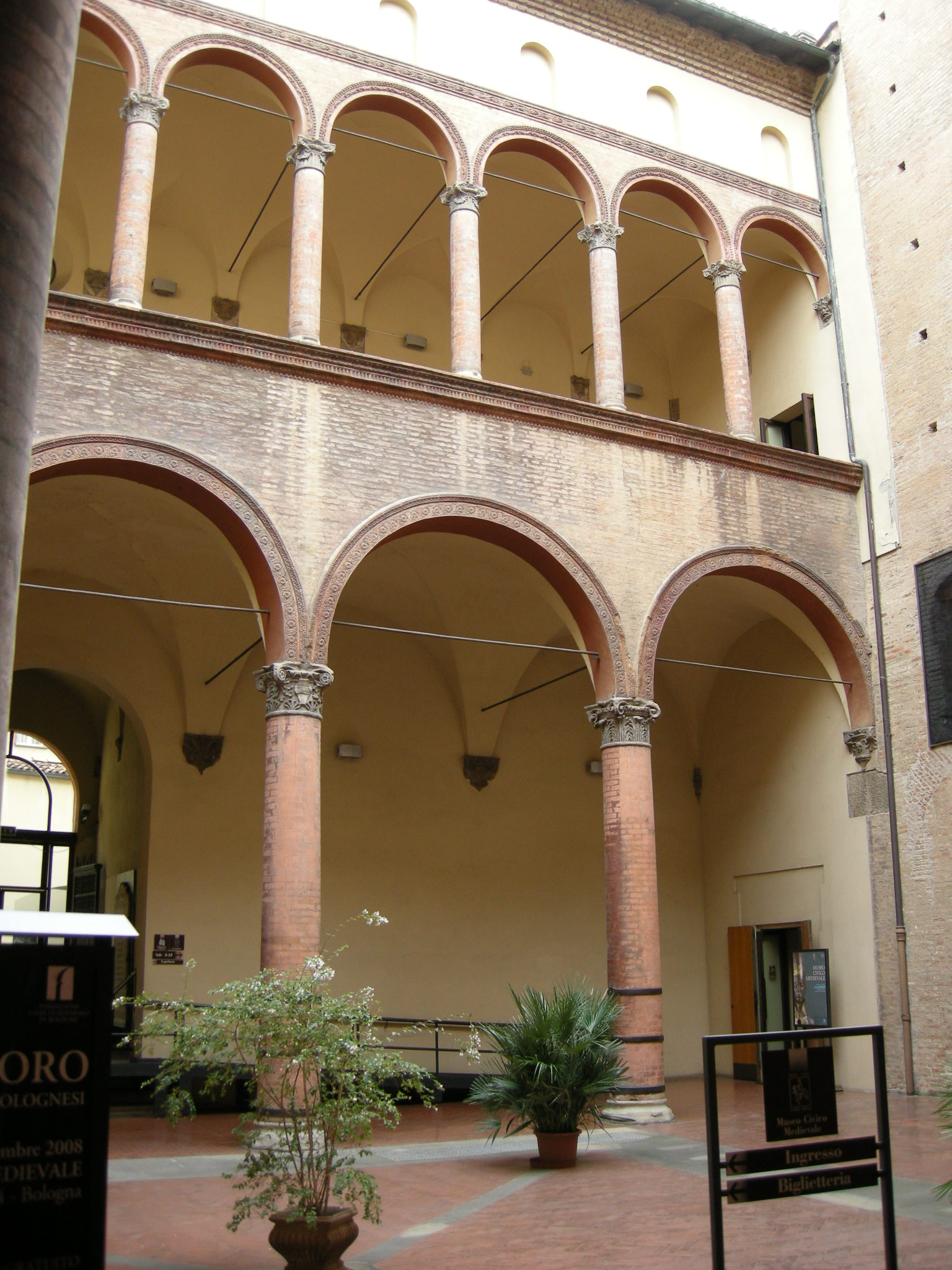 Museo civico medievale (Bologna), cortile